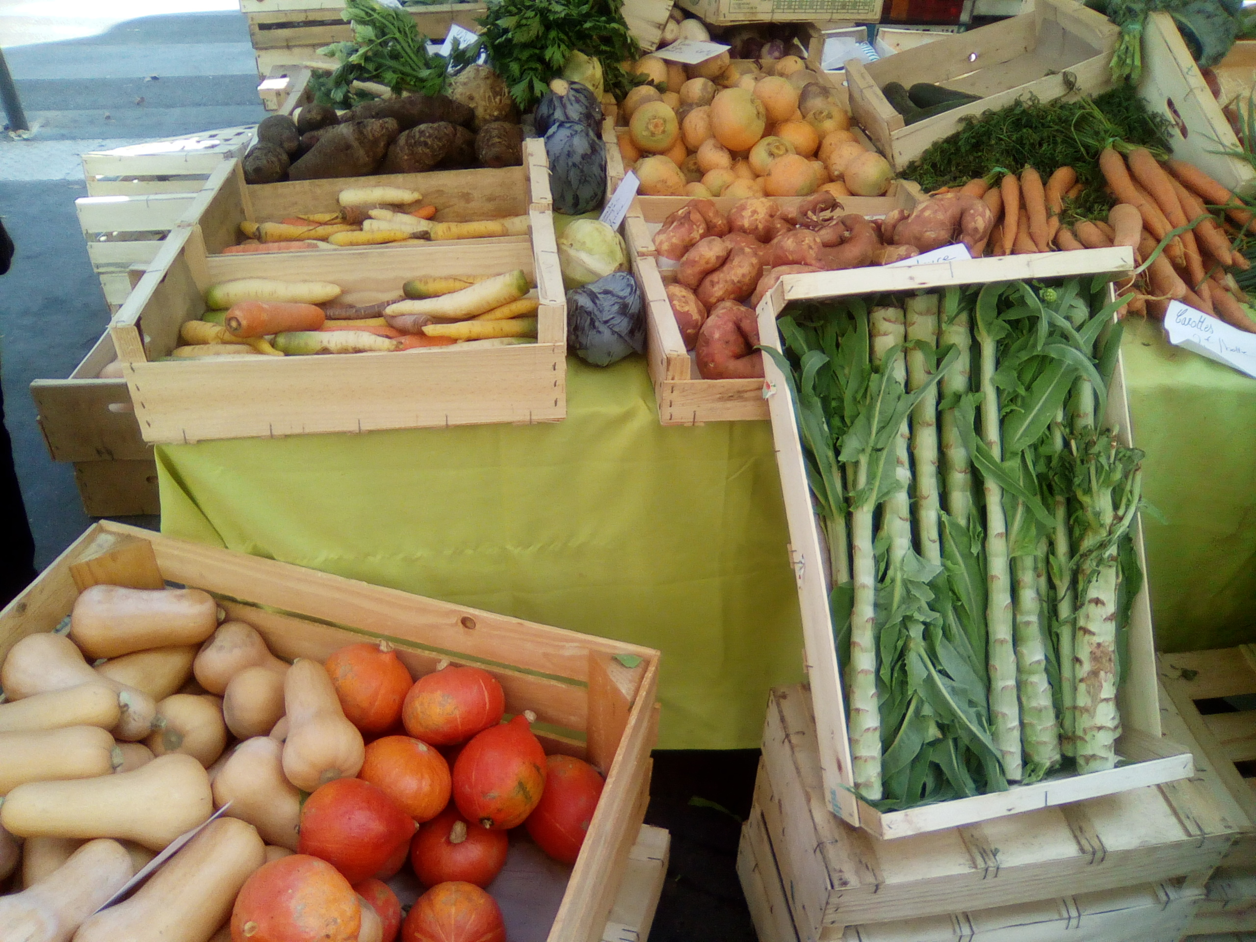 Marché des producteurs de pays, boulevard de Reuilly, Paris 12e.